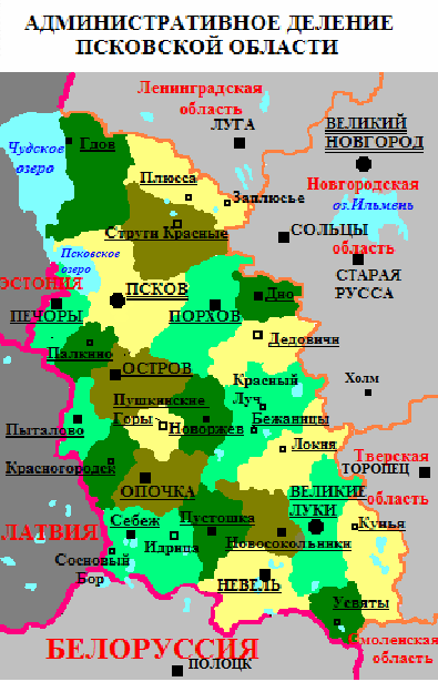 Административная карта Псковской области